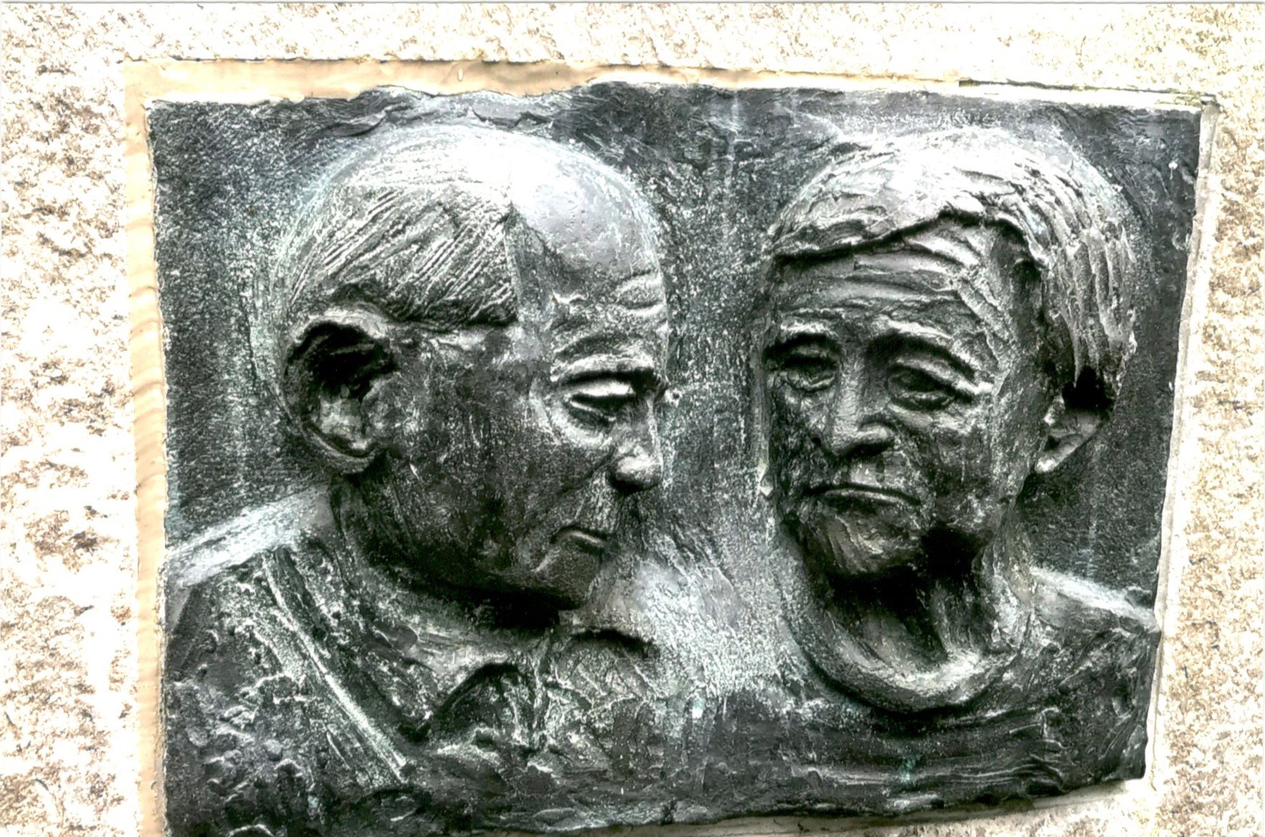 Diese eindrucksvolle Grabplastik in Bronze der verstorbenen Eltern in Krefeld hat deren Tochter Rosmarie Kühne 2006 geschaffen.